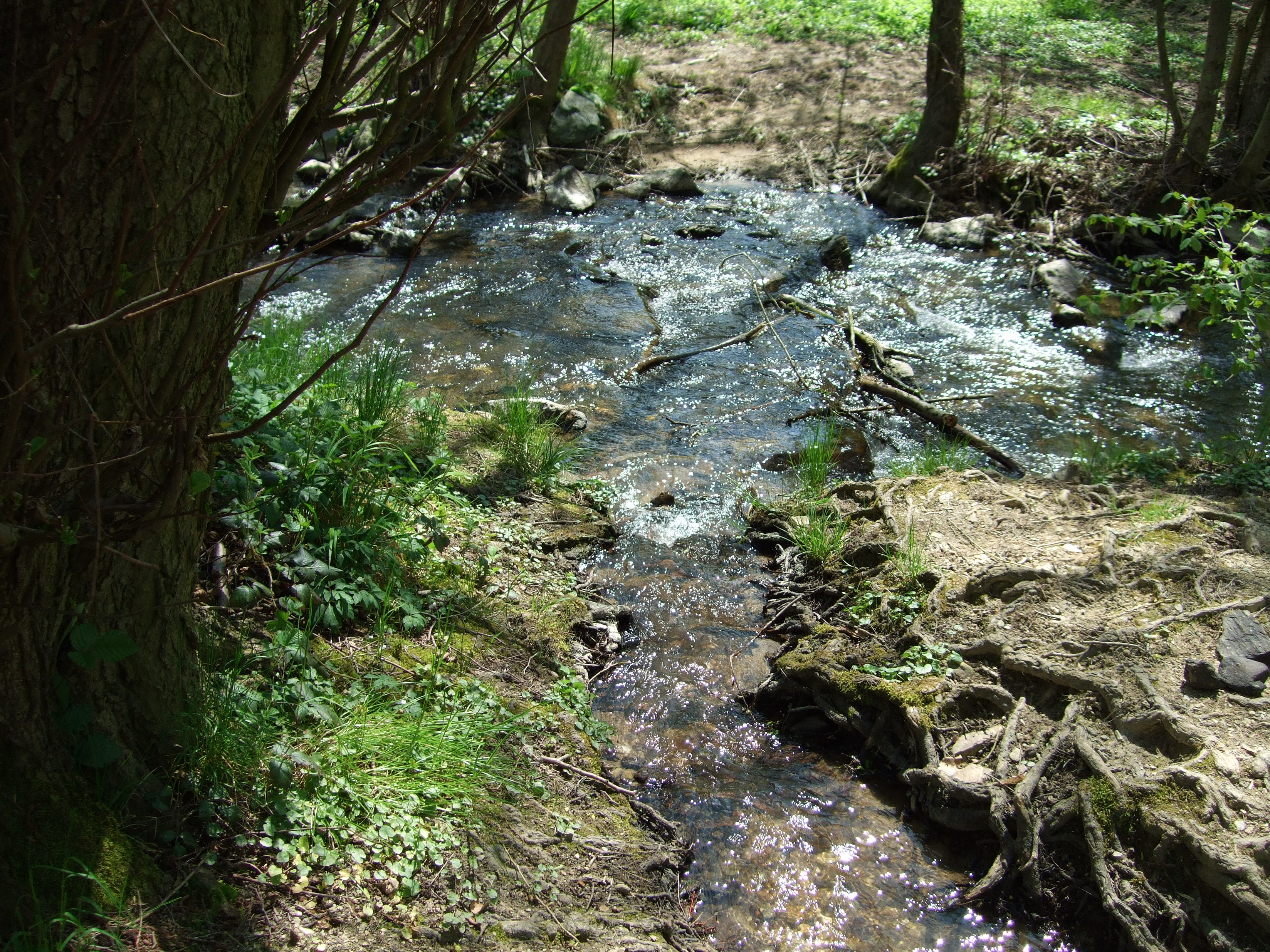 Einmündung in den Liederbach